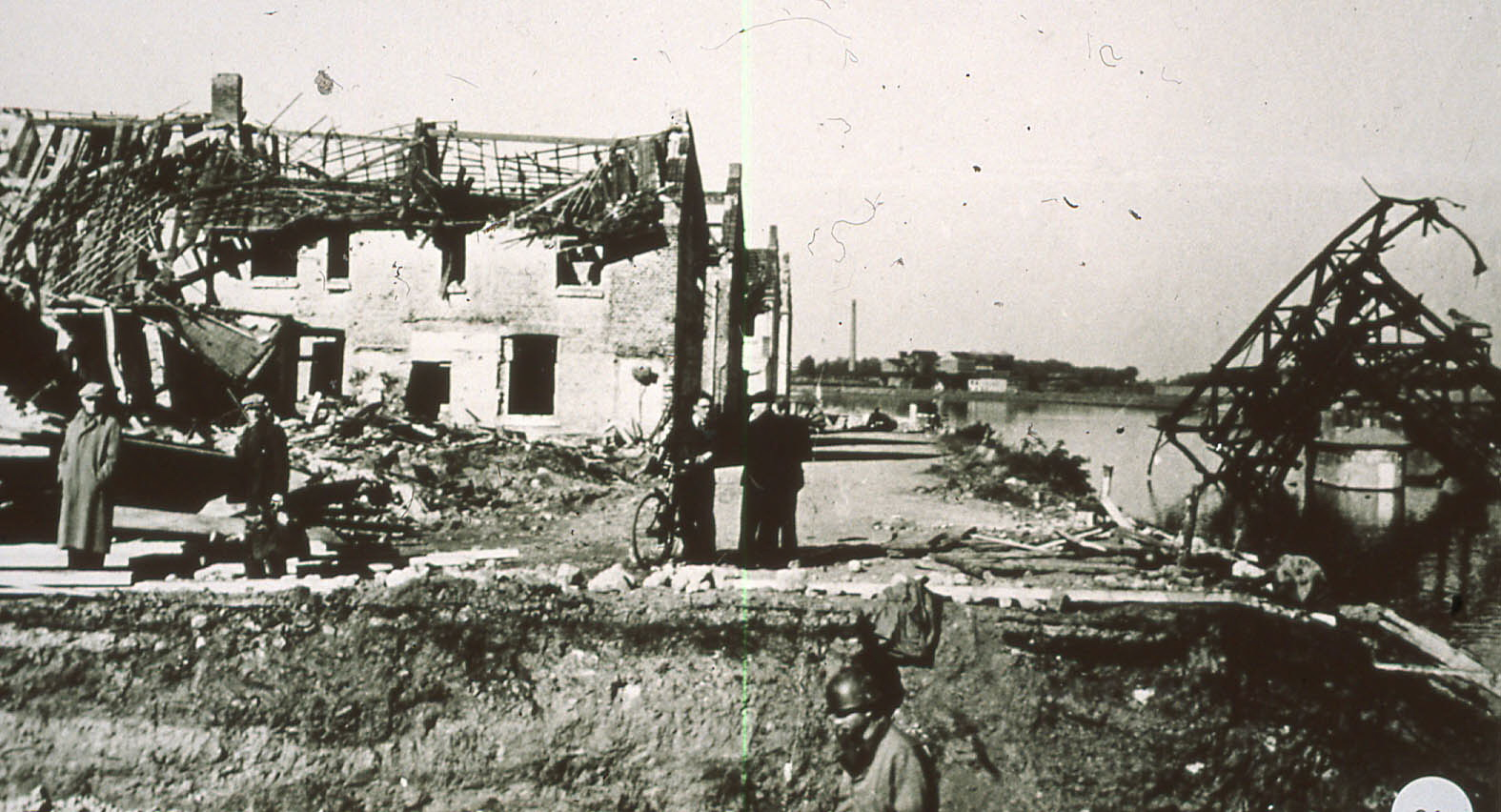 Verwoestingen na een geallieerd bombardement op Maastricht op 18 augustus 1944 en het opblazen van de Spoorbrug door de Duitsers op 12 september. Links de arbeiderswijk Quartier Amélie aan de Fransensingel, waar tientallen doden vielen. Rechts de spoorwegbrug, het eigenlijke doelwit. Fotocollectie RHCL Maastricht, GAM 19758.